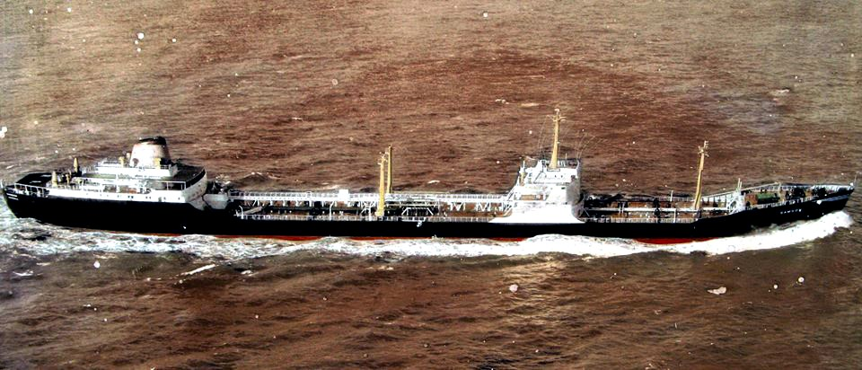 המיכלית סמסון של חברת אל-ים